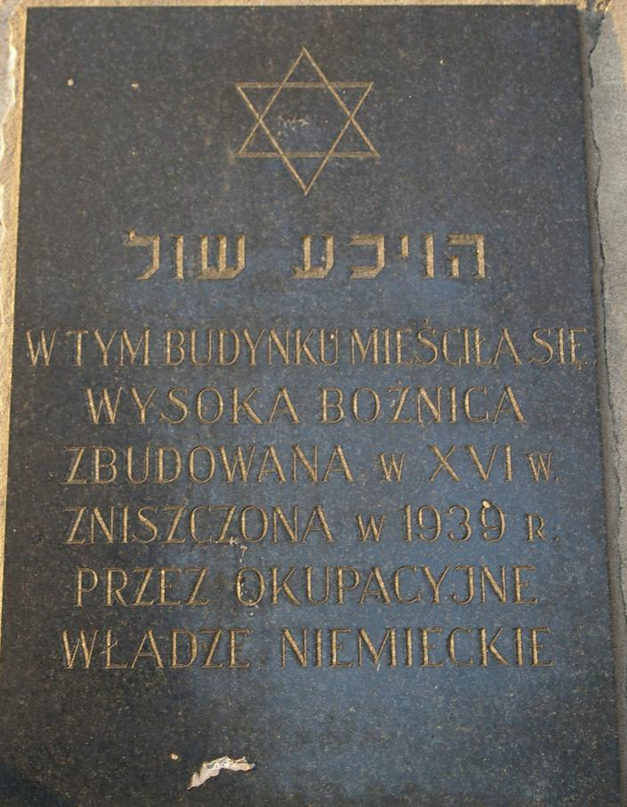 Tablica pamiątkowa na Synagodze Wysokiej w Krakowie